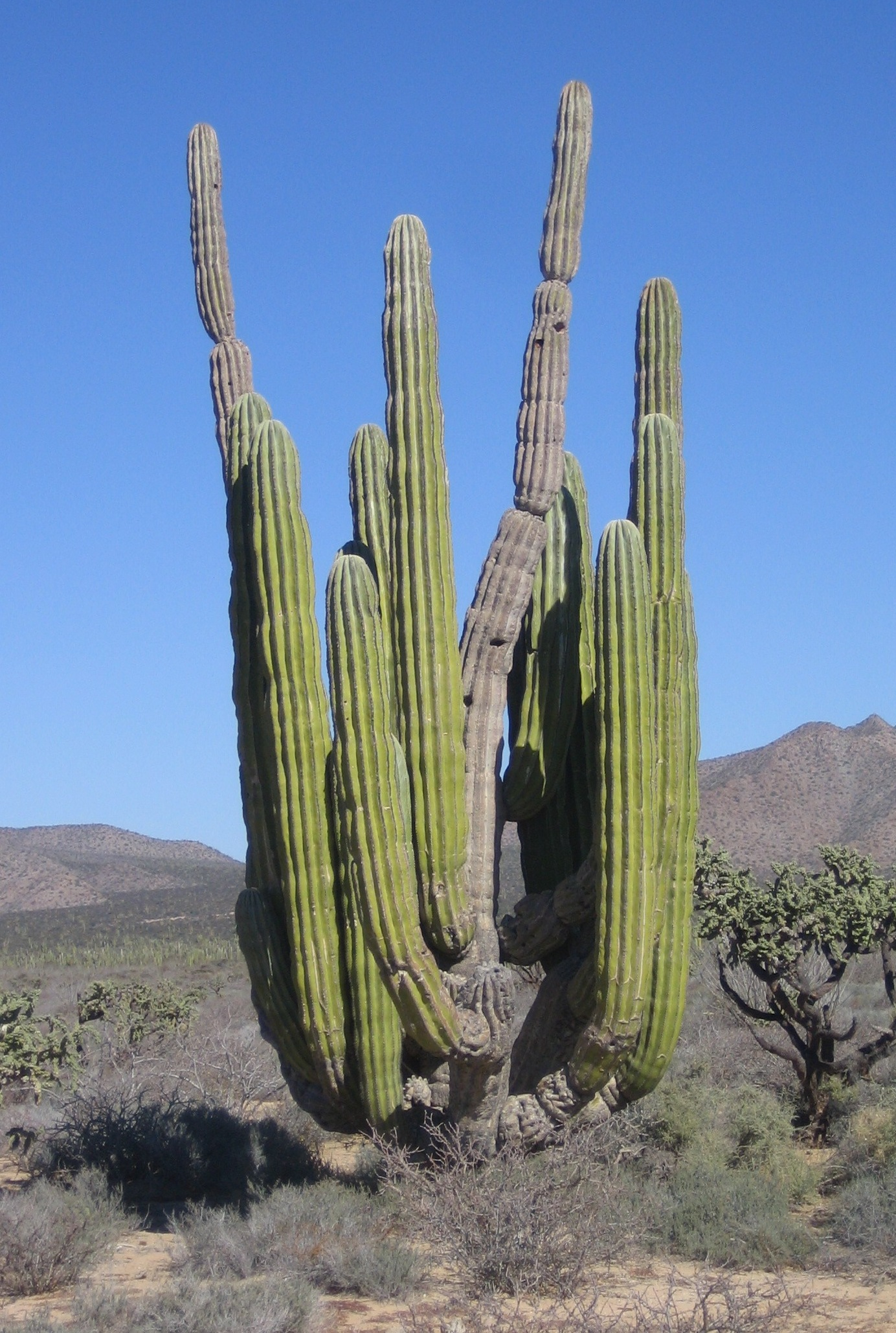 Pachycereus pringlei, cardón, sagueso, sahueso, giant cactus